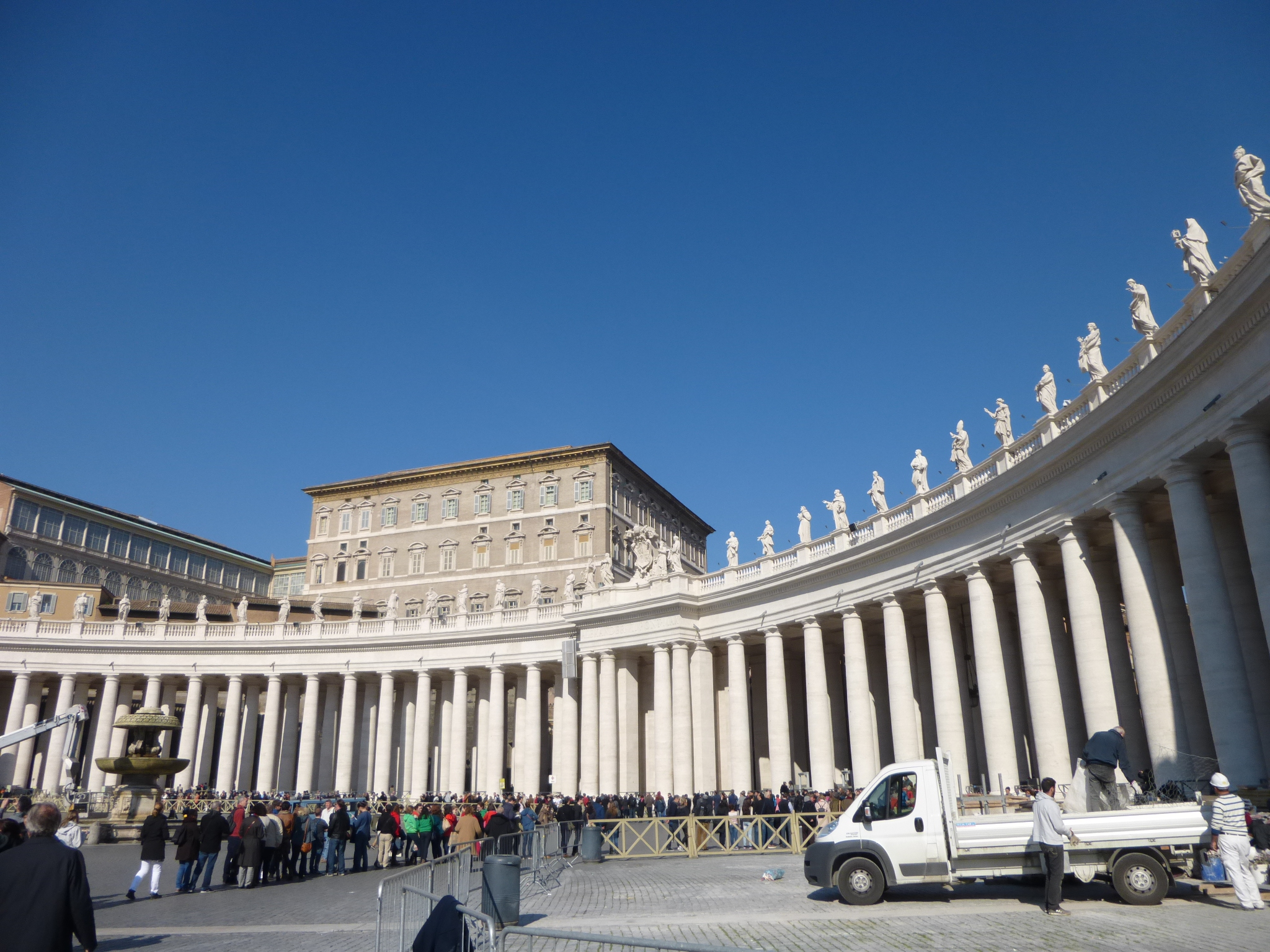 Roma, piazza san Pietro: restauro del colonnato completato. Sgombero finale del cantiere.